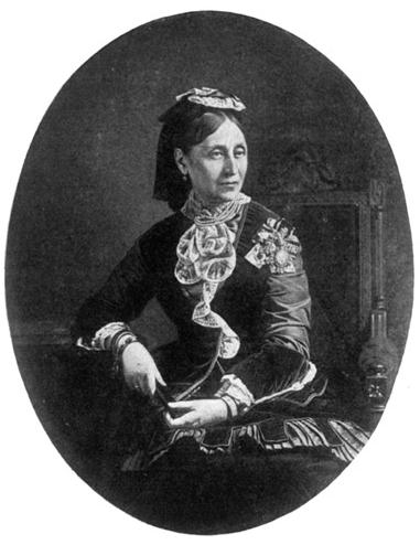 Ольга Александровна Томи́лова (урождённая Энгельга́рдт) (1822—1894) — начальница Смольного института благородных девиц в 1875—1886 годах, фрейлина российского императорского двора